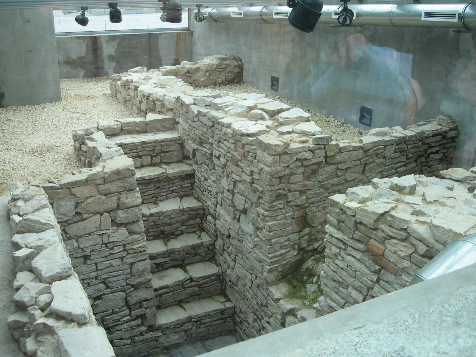 Fundamenty wagi miejskiej odsłonięte na Rynku podczas prac archeologiczych.